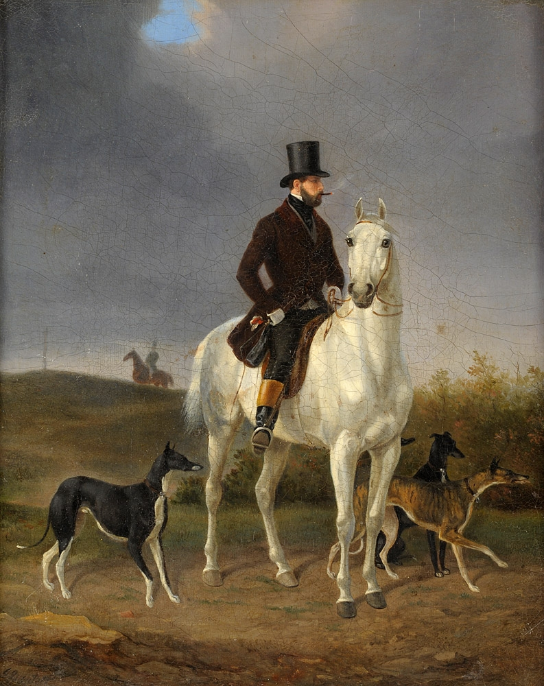 Ausritt zur Jagd mit Windhunden. Signiert. Öl auf Leinwand, 26 x 21 cm